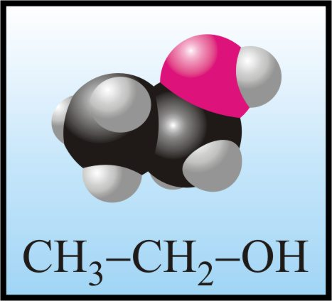 ethanol molecule